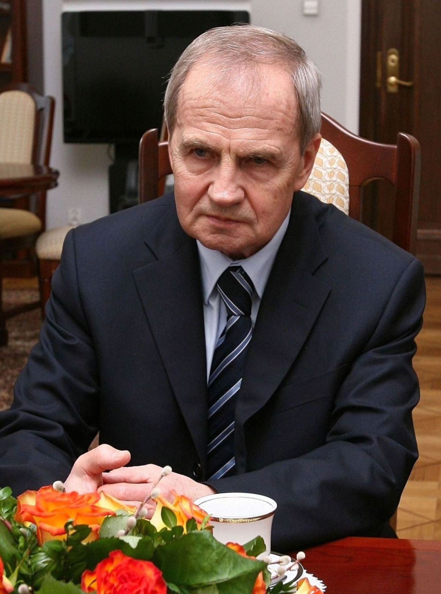 Prezes Sądu Konstytucyjnego Federacji Rosyjskiej Walerij Zorkin w Senacie RP